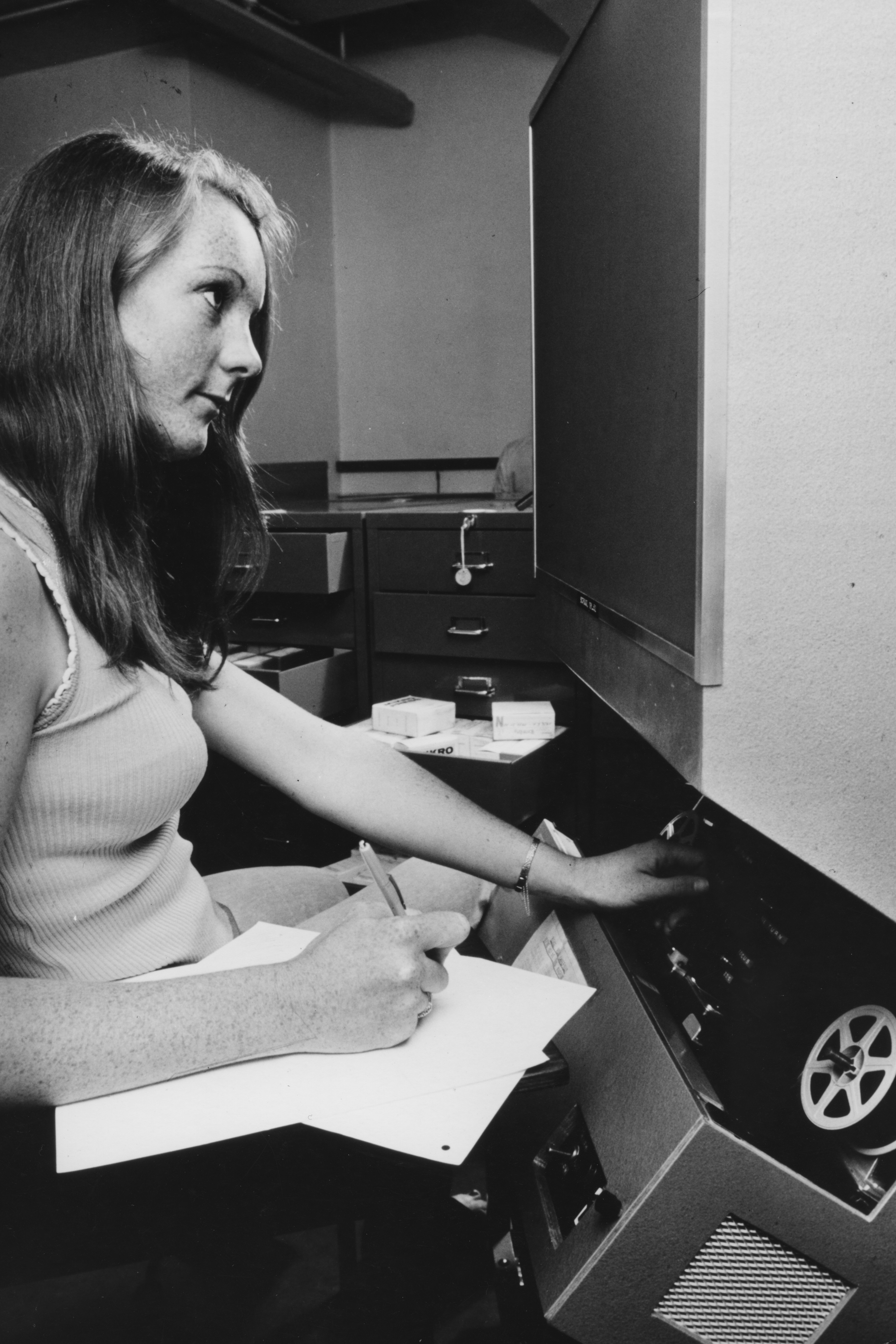 IMAGELIBRARY/470 Persistent URL